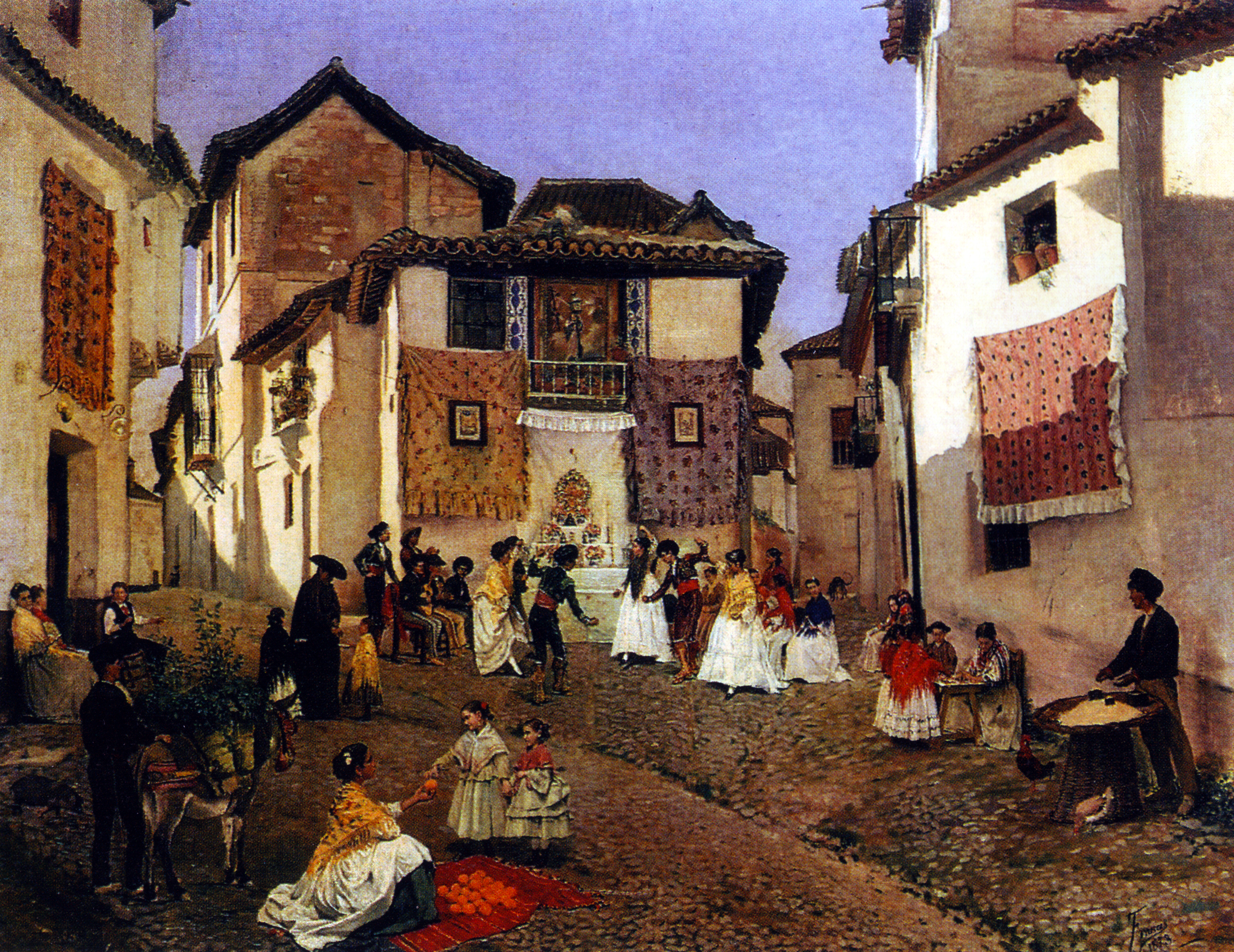 Cruz de Mayo en el Albaicin